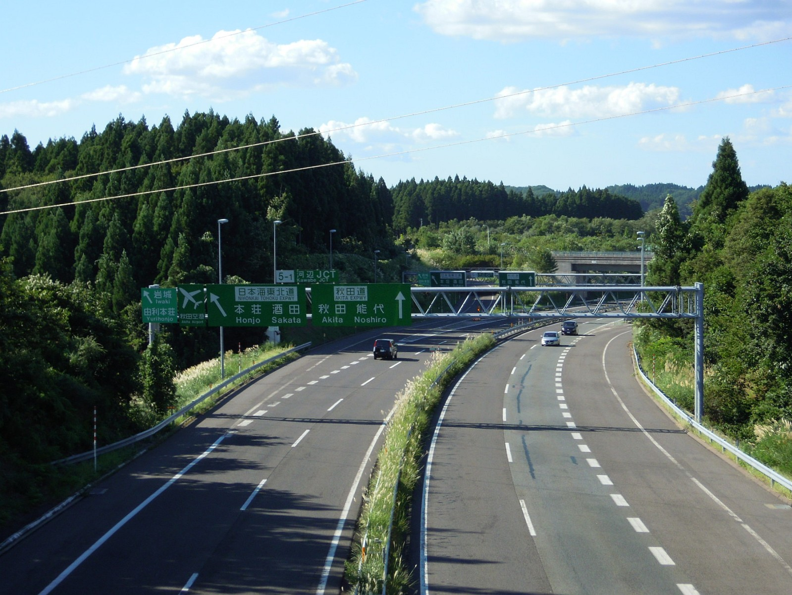 秋田県秋田市にある秋田自動車道の河辺ジャンクションを横手方面から。